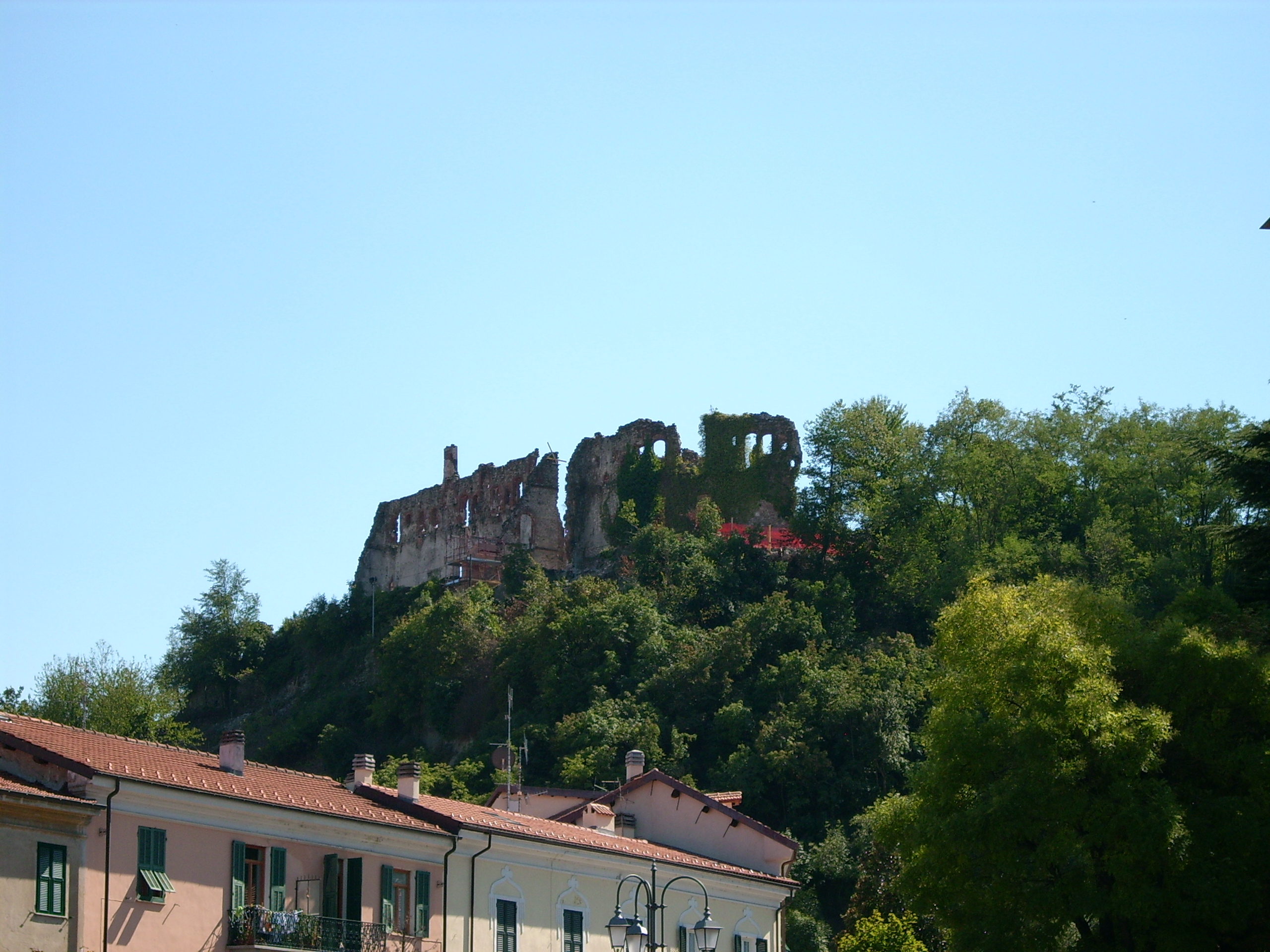 Cairo Montenotte, Liguria, Italia